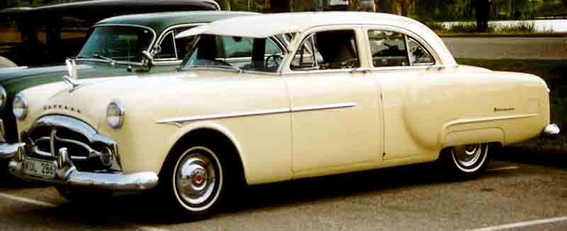 Packard 200 De Luxe 4-Door Sedan 1951